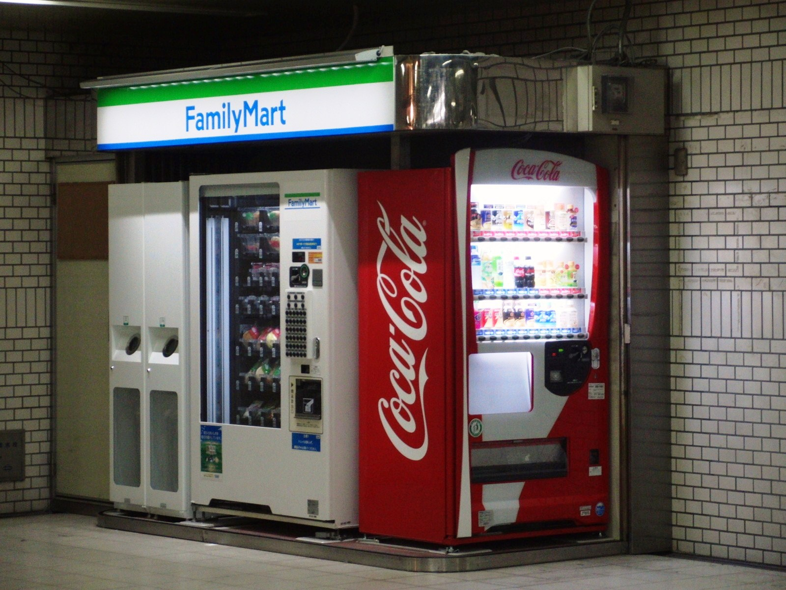 大阪市営地下鉄御堂筋線なかもず駅にあるファミリーマートのコンビニ自販機（ASD）を撮影。有人店舗設置までの繋ぎだったため後に撤去され有人店舗となった。